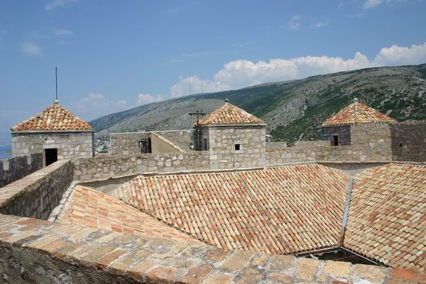 Burg Nehajgrad, eigenes Foto von 2005, public domain